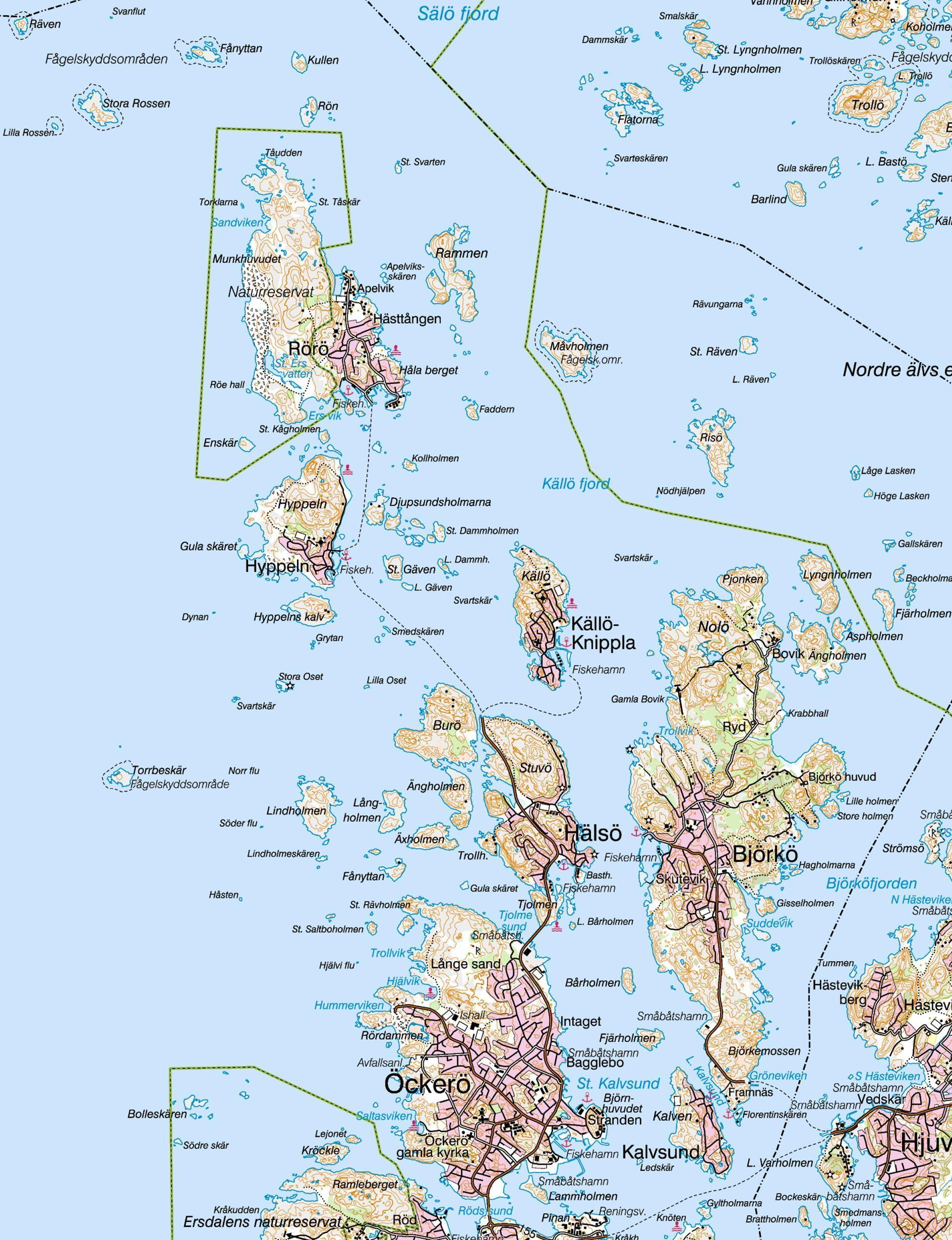 552 Norra Göteborg. Kartdata: Lantmäteriet, licens CC BY. Detalj den norra delen Göteborgs norra skärgård, dvs. öarna runt Hälsö.